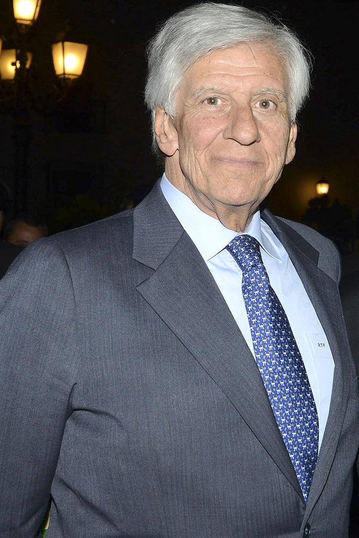 Raúl Torrealba, político chileno.